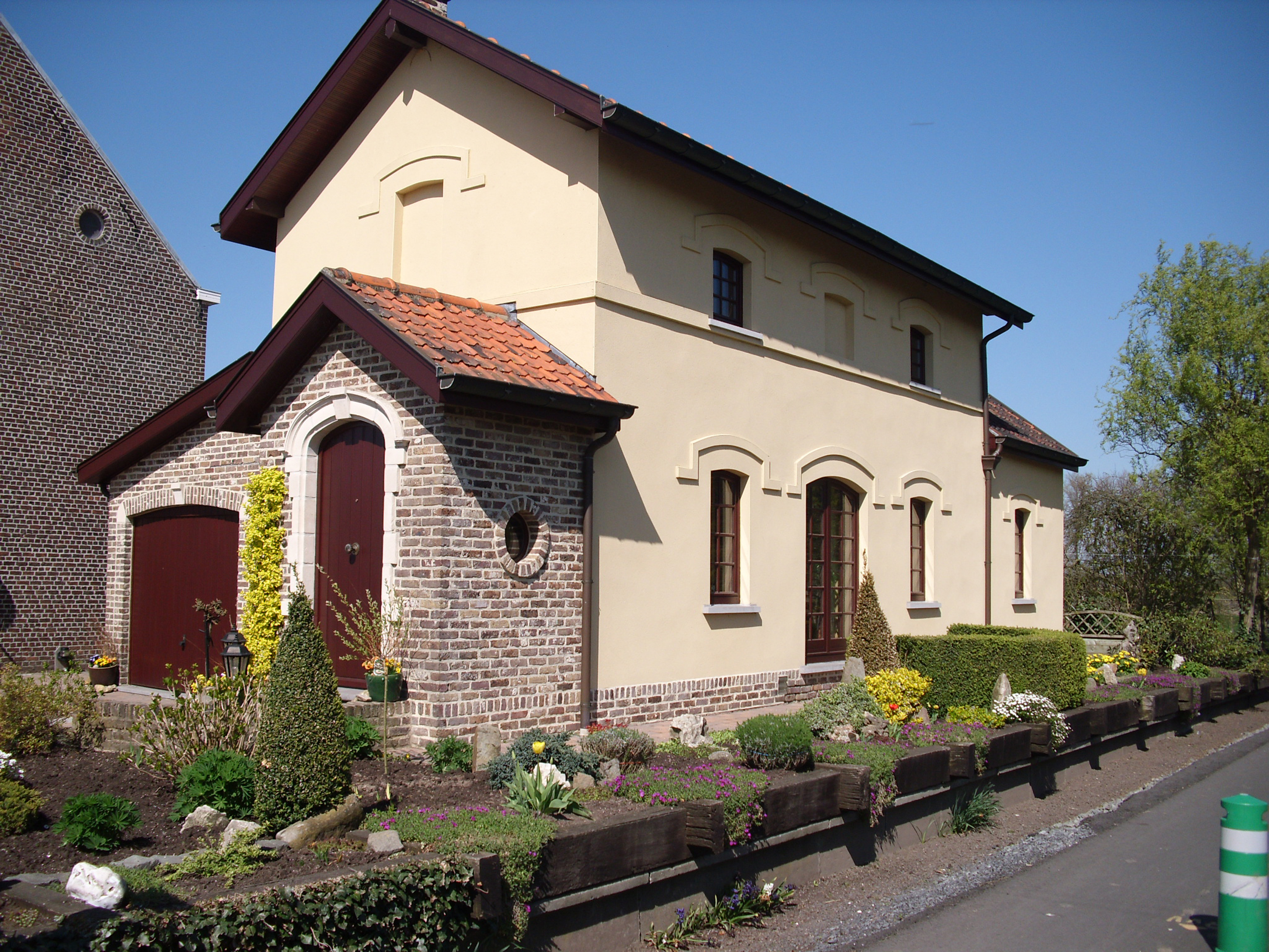 Spoorweghuisje op Spoorlijn 85 (Moeskroen - Oudenaarde) - Melden (nabij Koppenberg) - Oudenaarde - Oost-Vlaanderen - Vlaanderen - België.